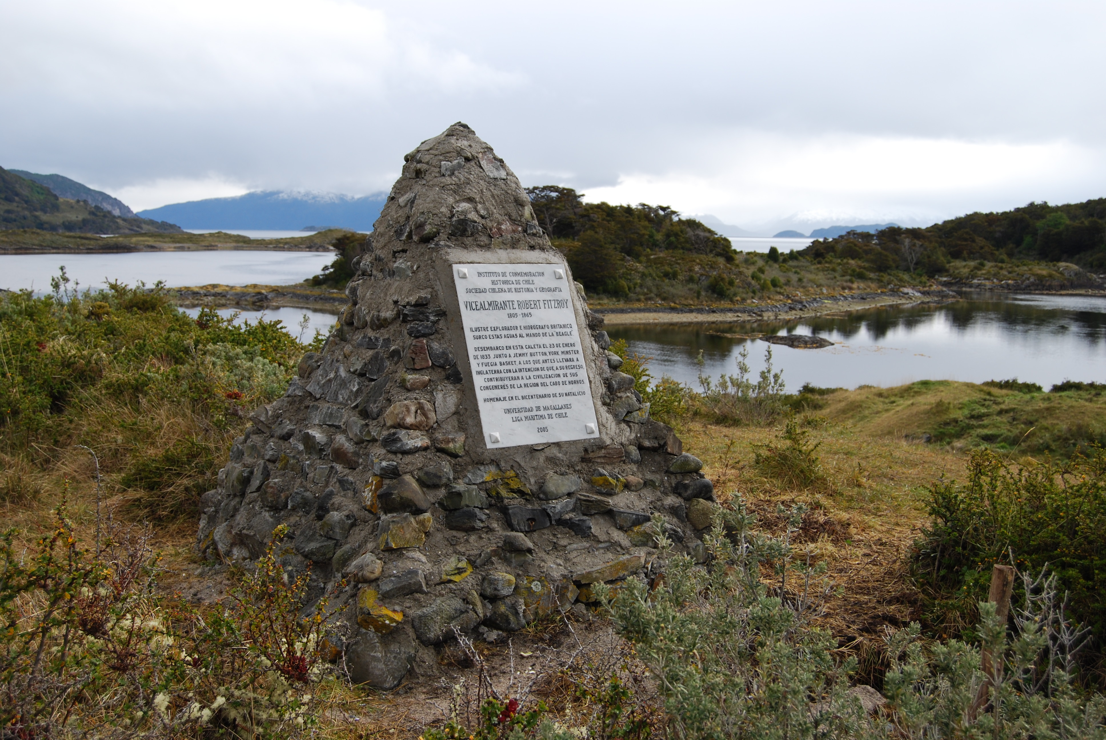 Túmulo y placa conmemorativa del bicentenario del nacimiento del vicealmirante Robert Fitzroy, levantado en caleta Wulaia, en 2005, en recuerdo de su desembarco el 23 de enero de 1833.